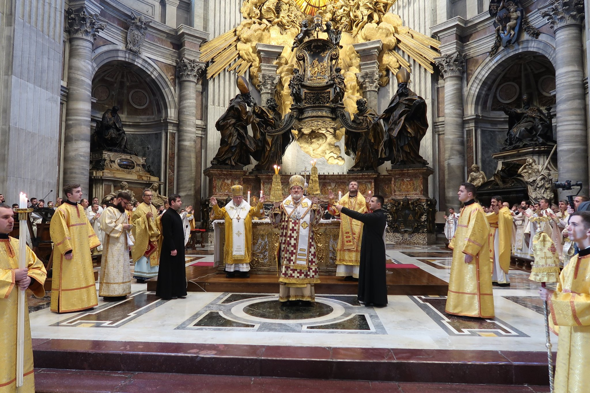 Byzantinische Göttliche Liturgie in St. Peter Basilika. Hauptzelebrant Bischof Milan Sasik